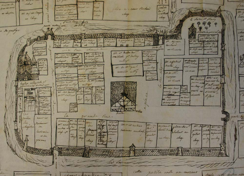 vue de cf. titre.